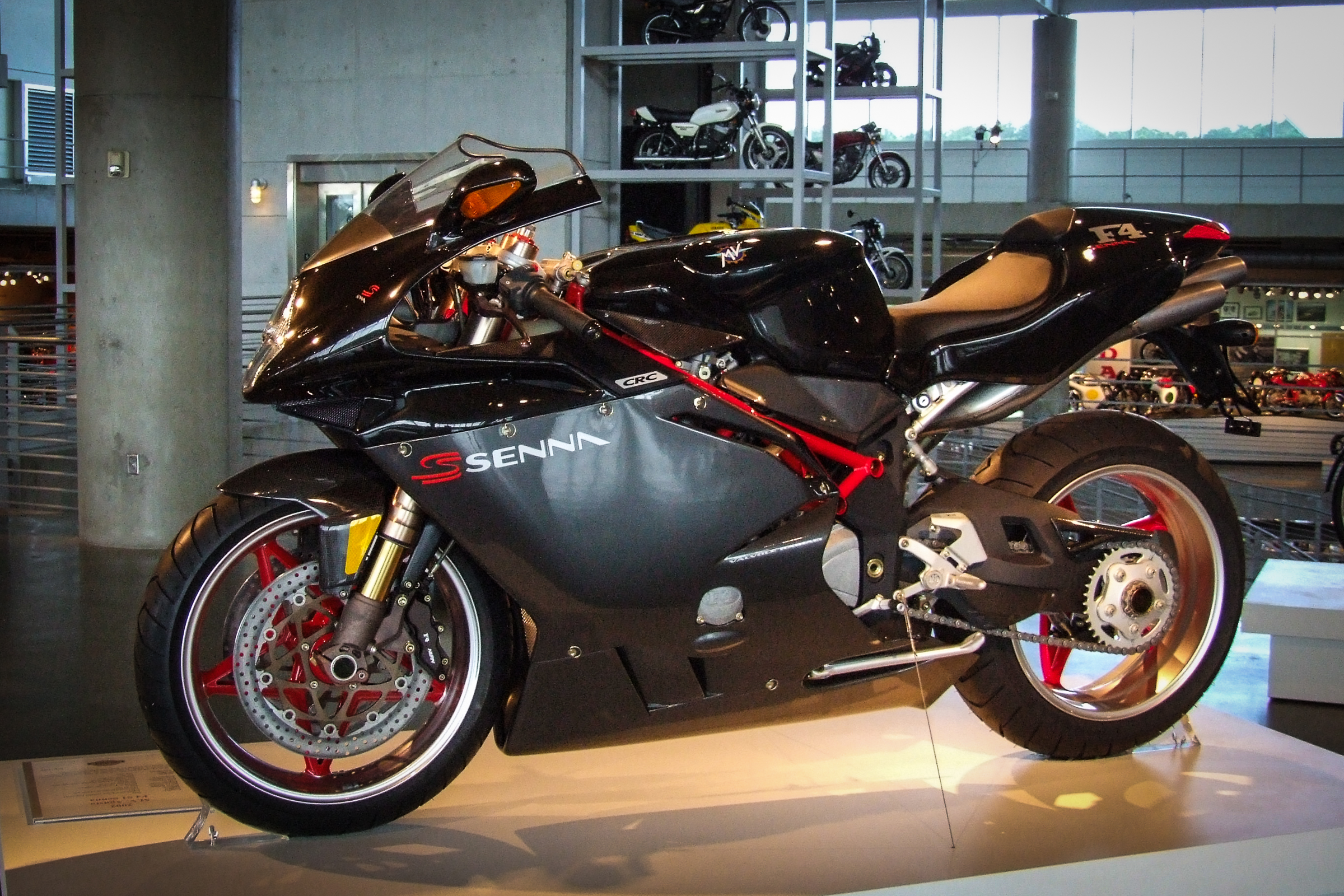 MV Agusta F4 S1 Senna (2002) im Barber Vintage Motorsports Museum, Birmingham Alabama USA